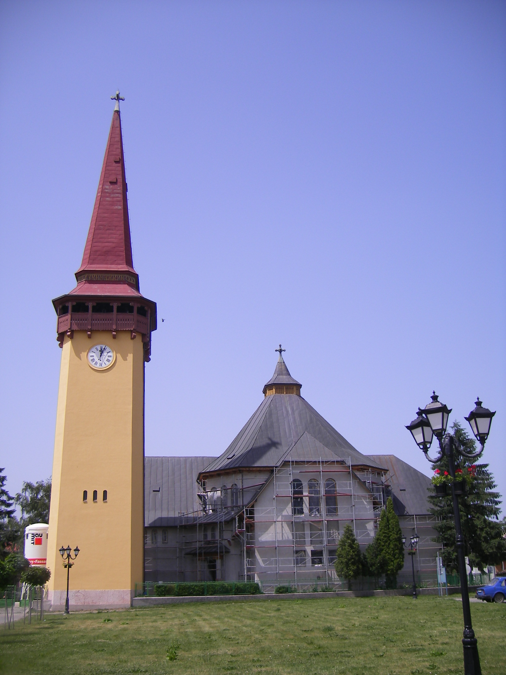 Ógyalla - Szent László katolikus templom